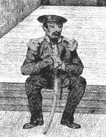 Porción del cuadro "Asamblea de jefes de las islas Sandwich en conferencia con el comandante de la Venus" por Louis-Jules Masselot, 1837